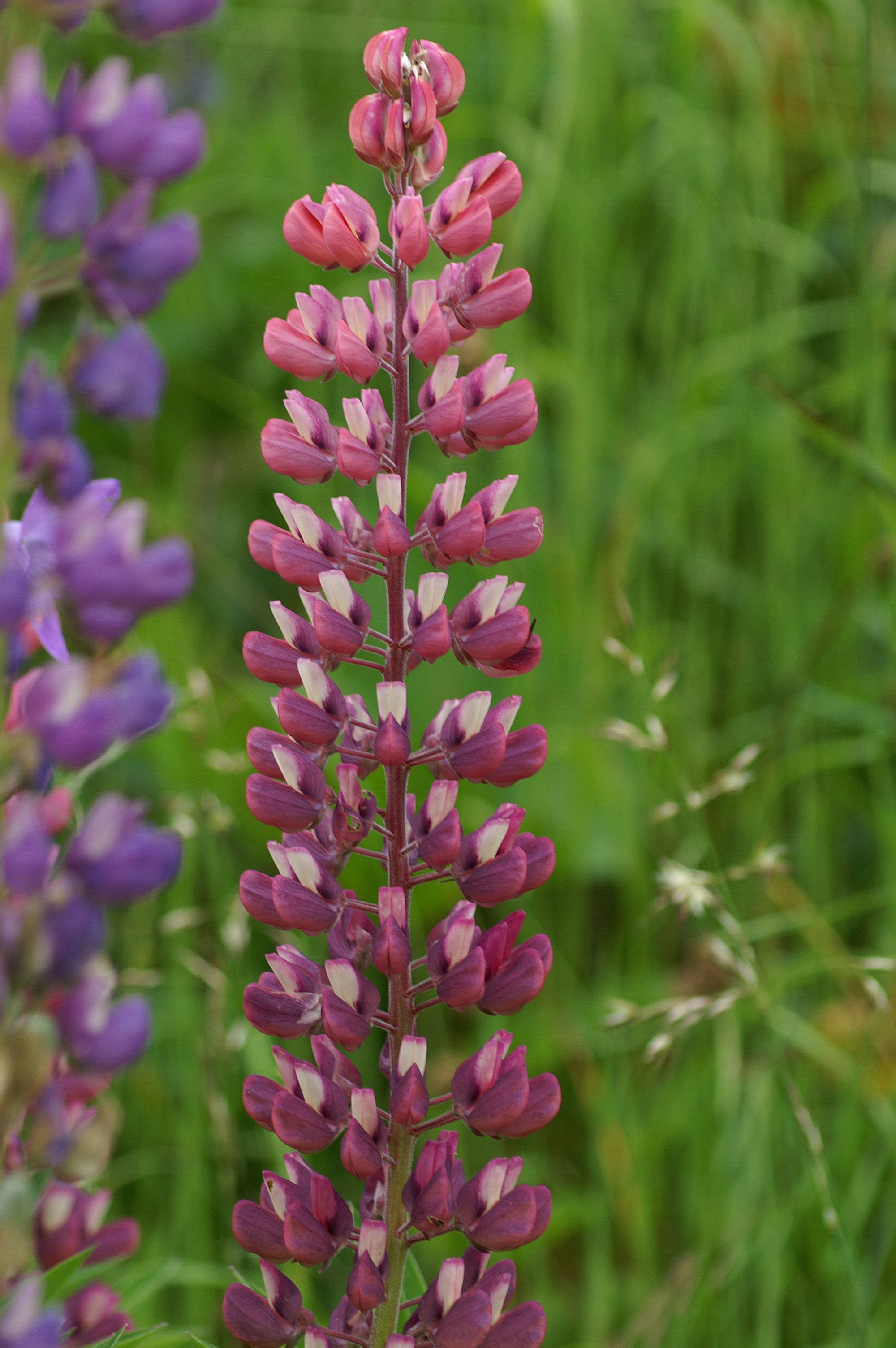 Die Vielblättrige Lupine (Lupinus polyphyllus), auch Stauden-Lupine genannt, ist eine Pflanzenart aus der Gattung der Lupinen (Lupinus), die zur Unterfamilie der Schmetterlingsblütler (Faboideae) innerhalb der Familie Hülsenfrüchtler (Fabaceae) gehört. Gesehen in Partenen , Vorarlberg